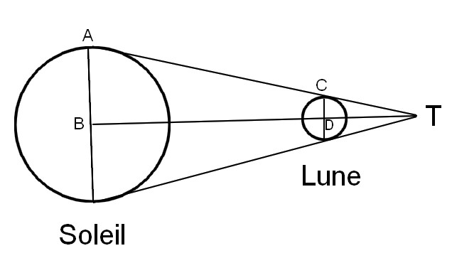 Lune et terre lors d'une éclipse solaire